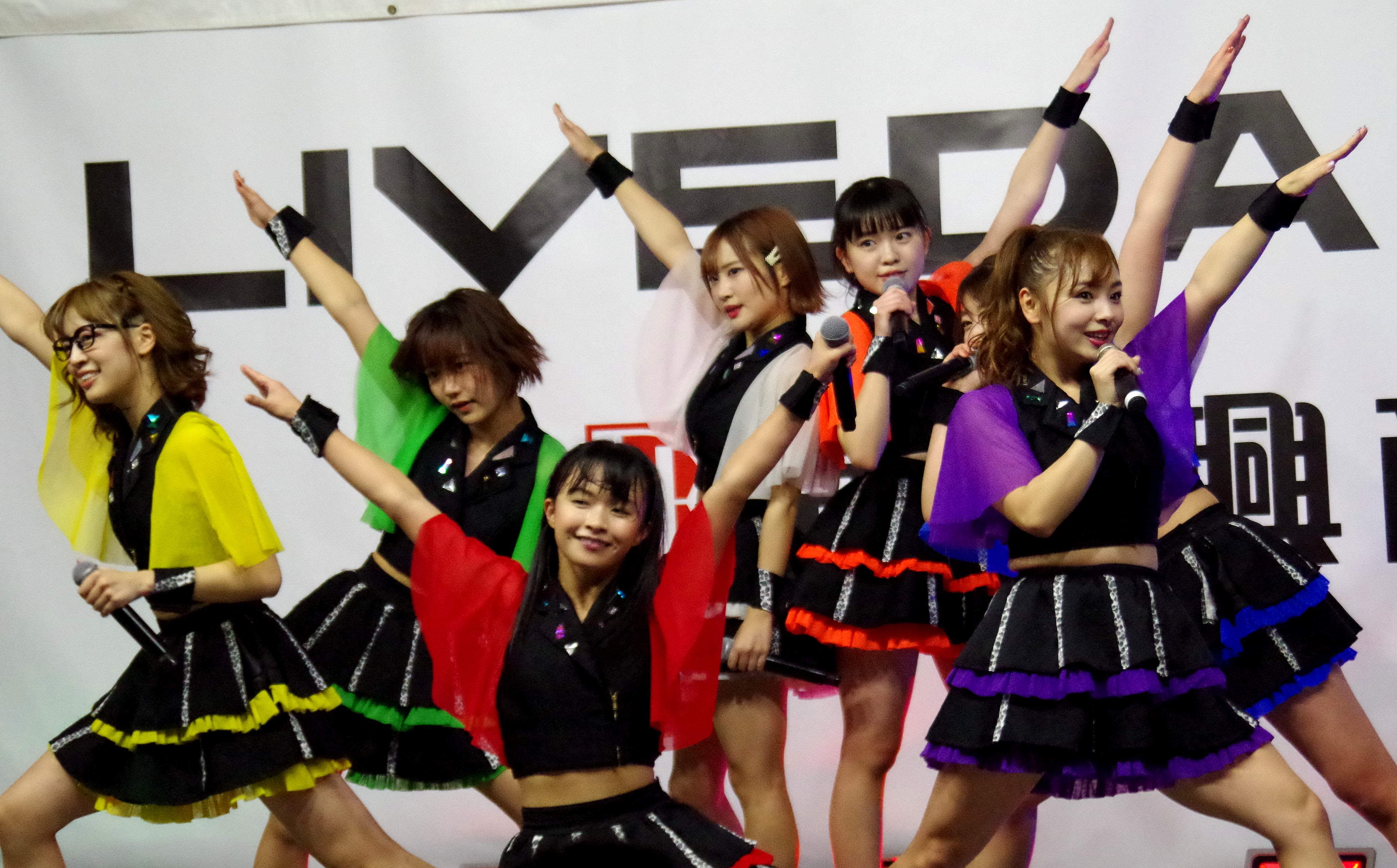 全力少女R アイドル